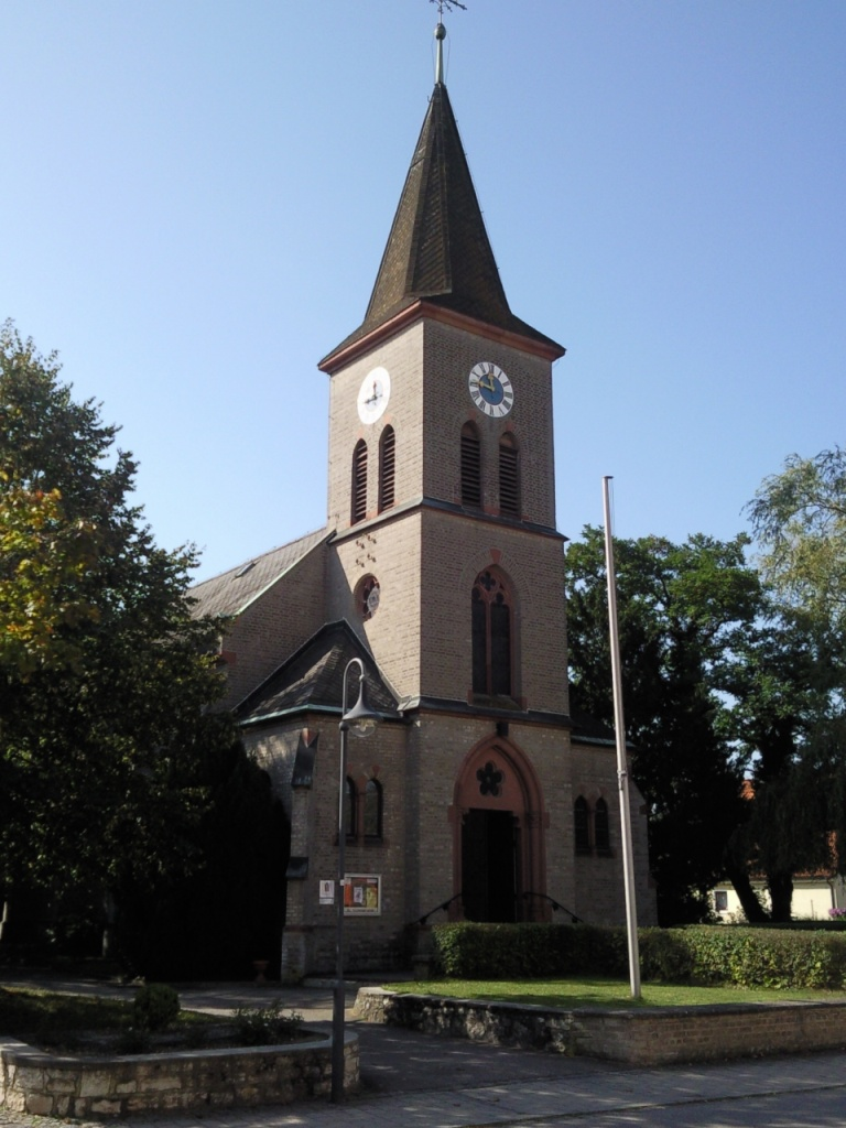 Maxhütte, Evangelische Segenskirche